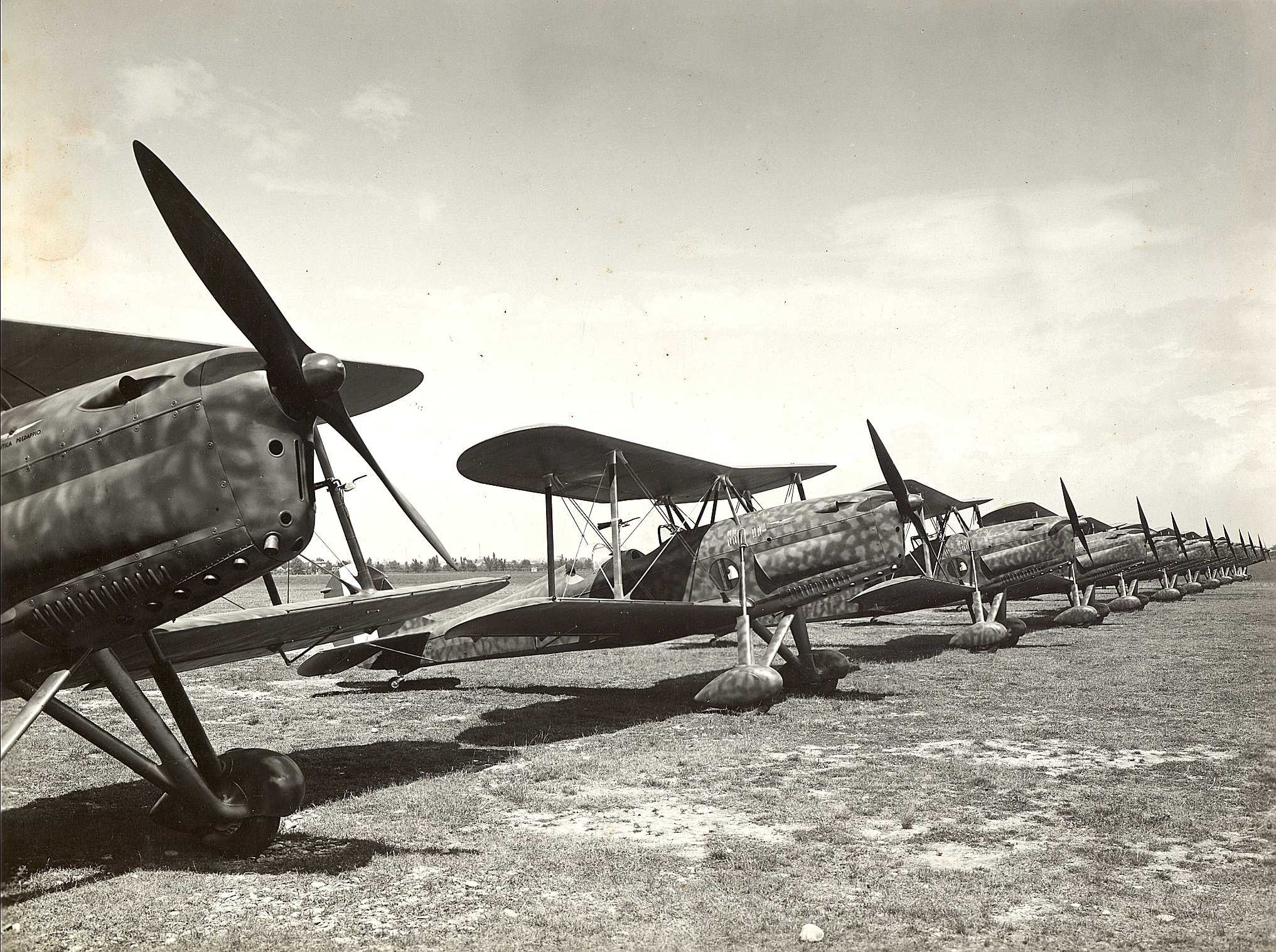 Aeronatica Caproni di Predappio aerei da combattimento Ca.164